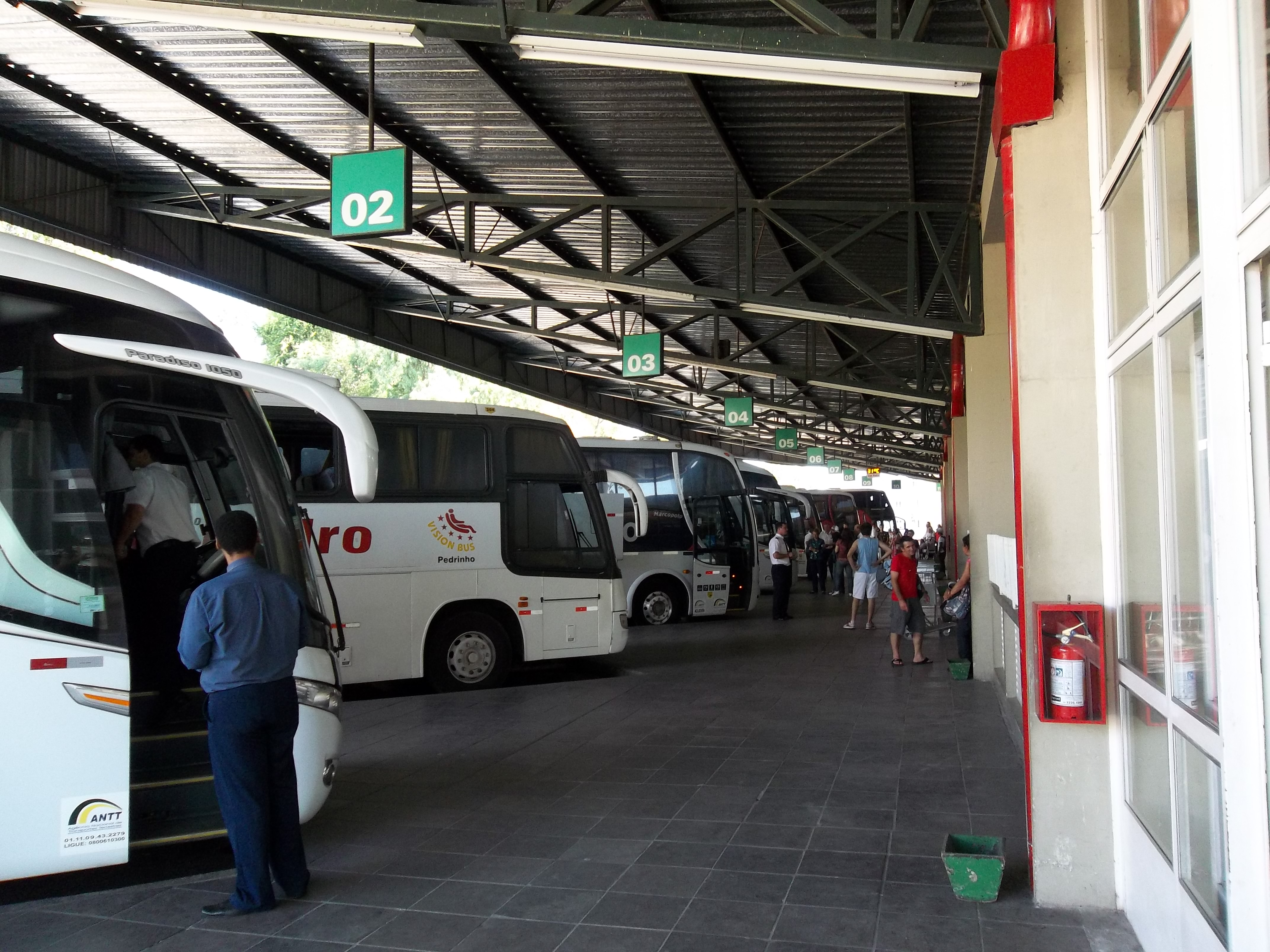 Estação Rodoviária de Santa Maria. Área de embarque, NS Lourdes, Sede, Santa Maria, Rio Grande do Sul, Brasil.